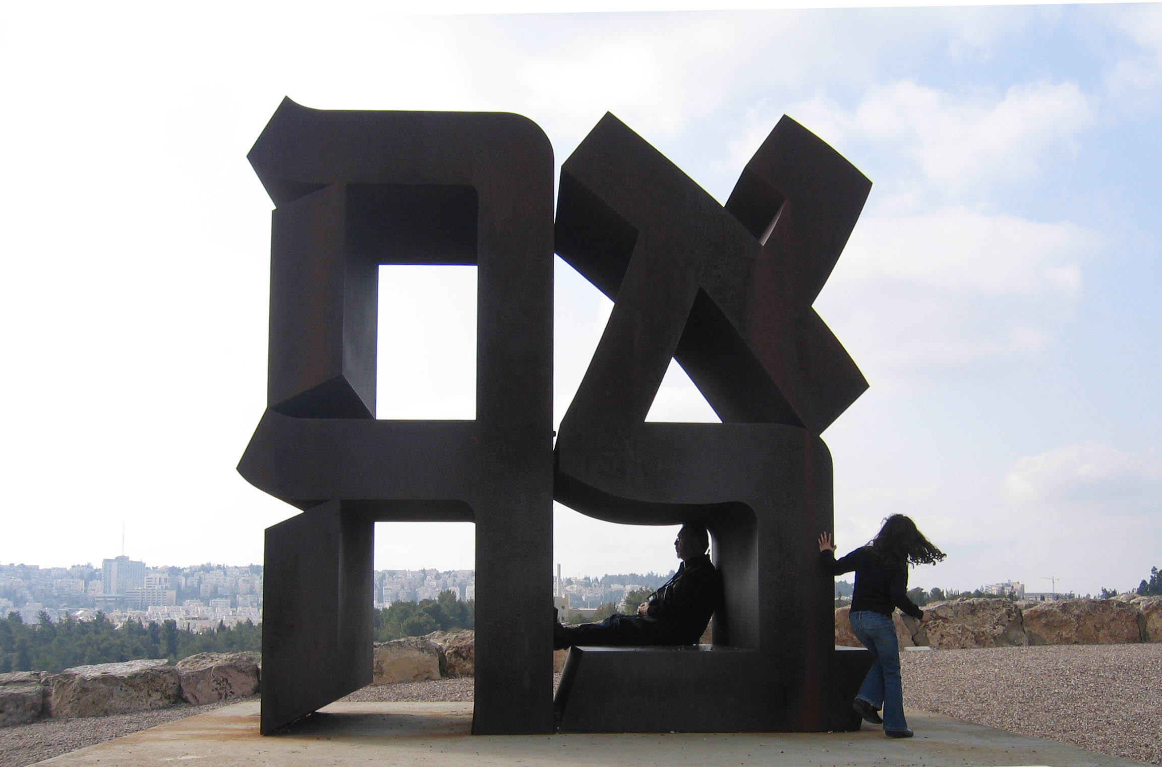 Sculpture